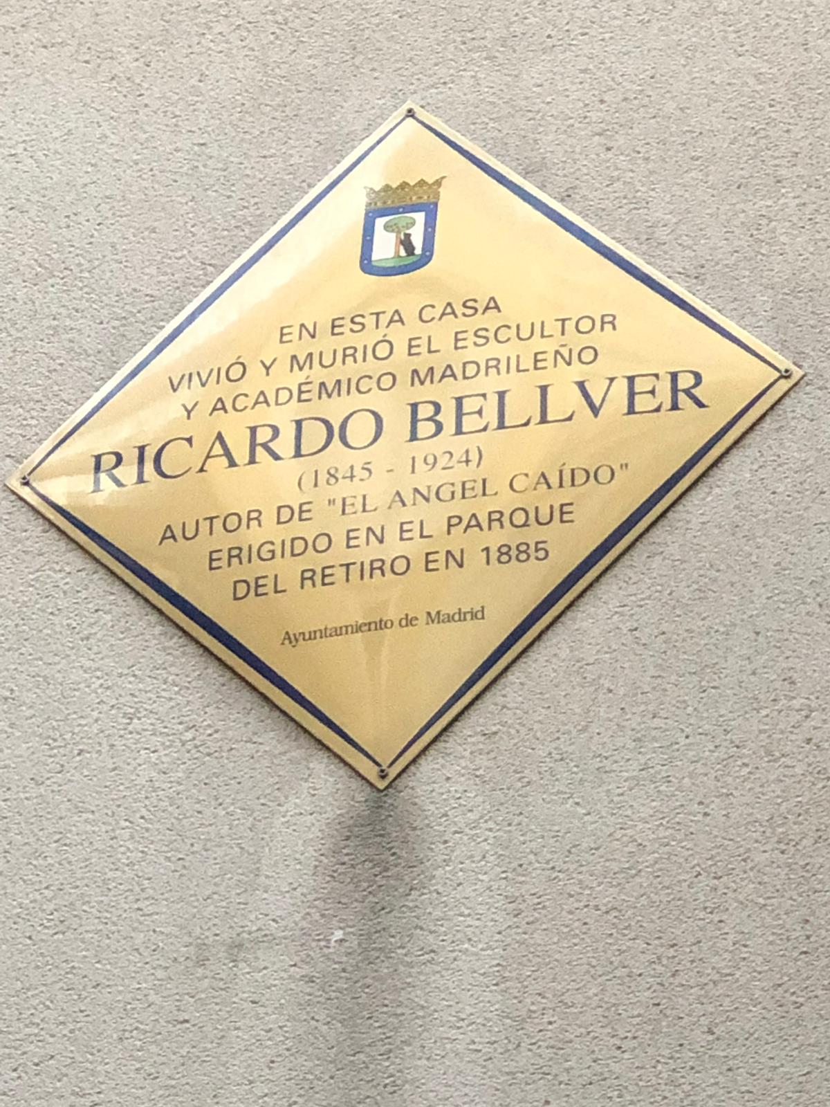 placa Ricardo Bellver, calle Cardenal Cisneros. Madrid